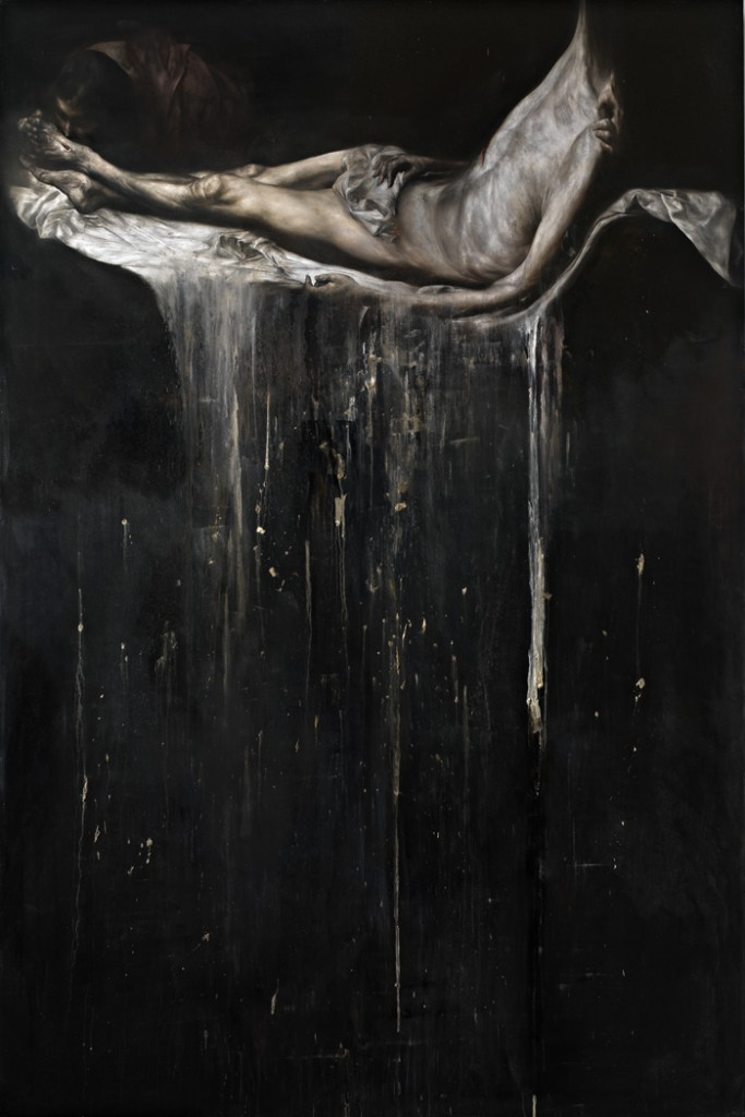 Tableau de Nicola Samori, Rapture, 2010